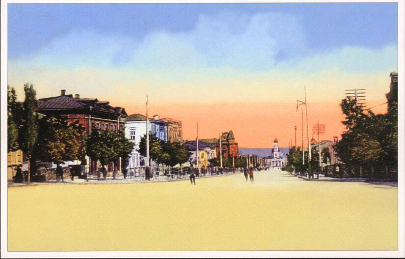 Mariupol old picture